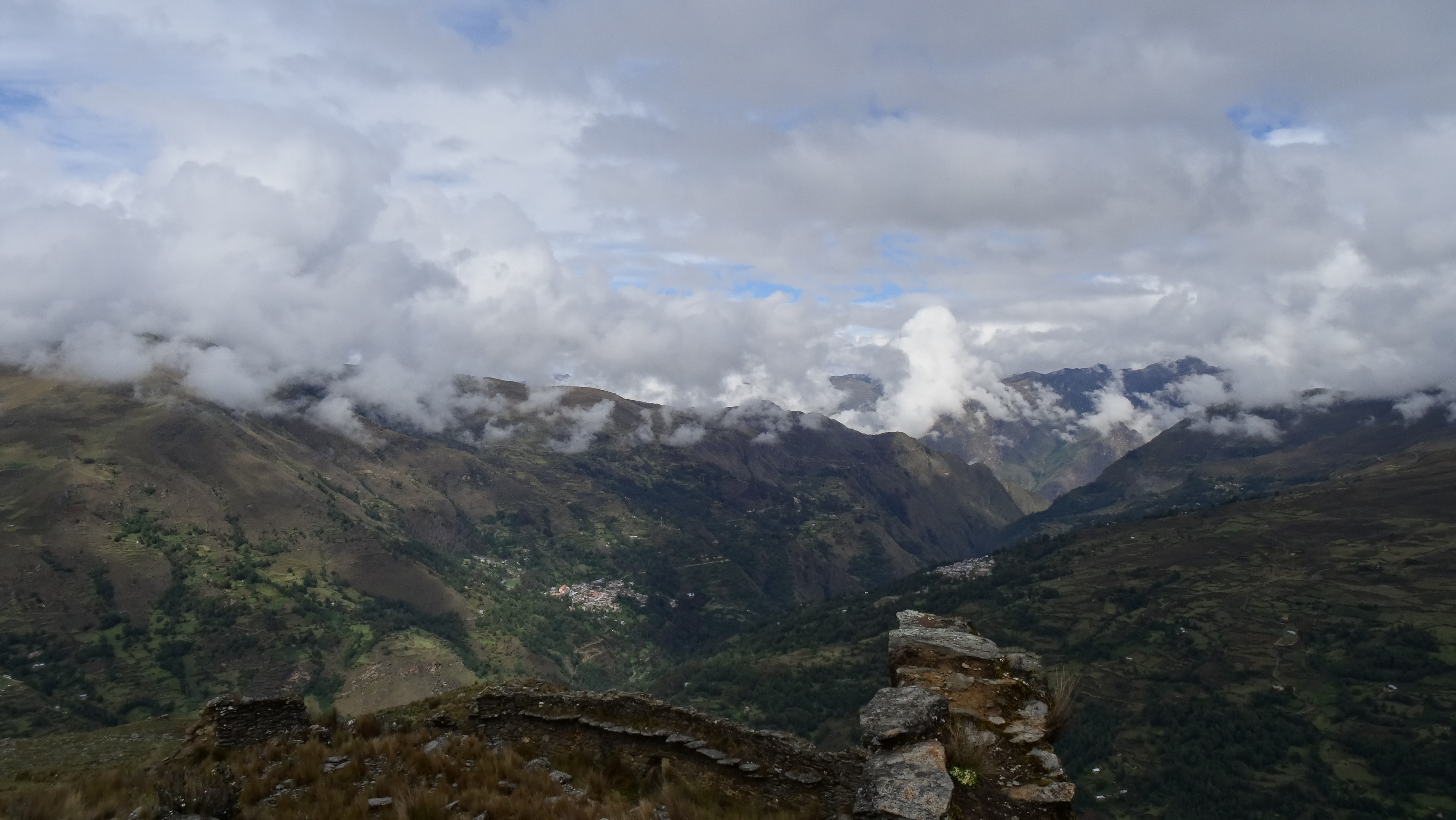 Vista de una parte del distrito de Tantamayo desde las ruinas de Susupillo.